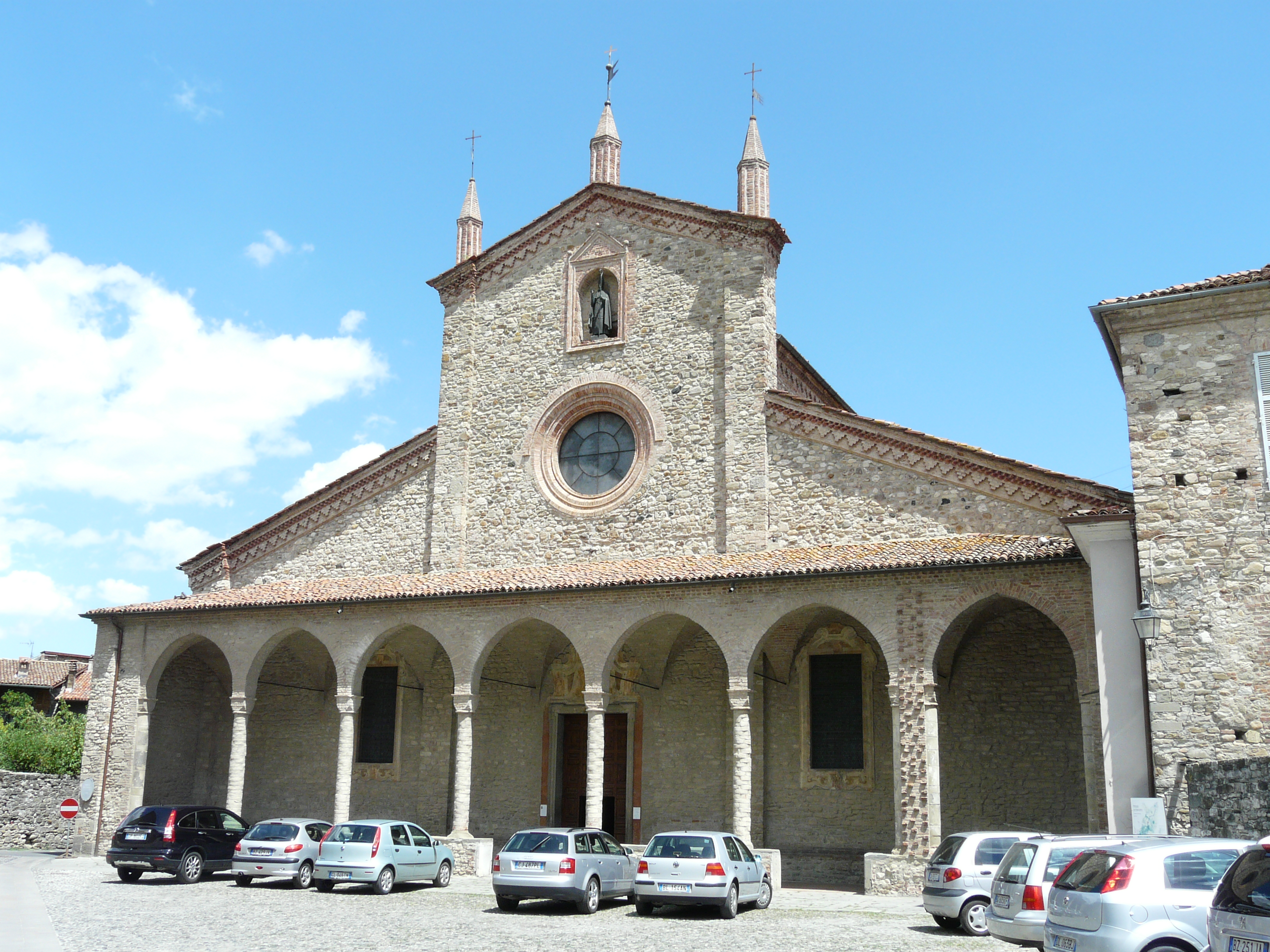 Immagini dell'abbazia di San Colombano di Bobbio, Emilia-Romagna, Italia